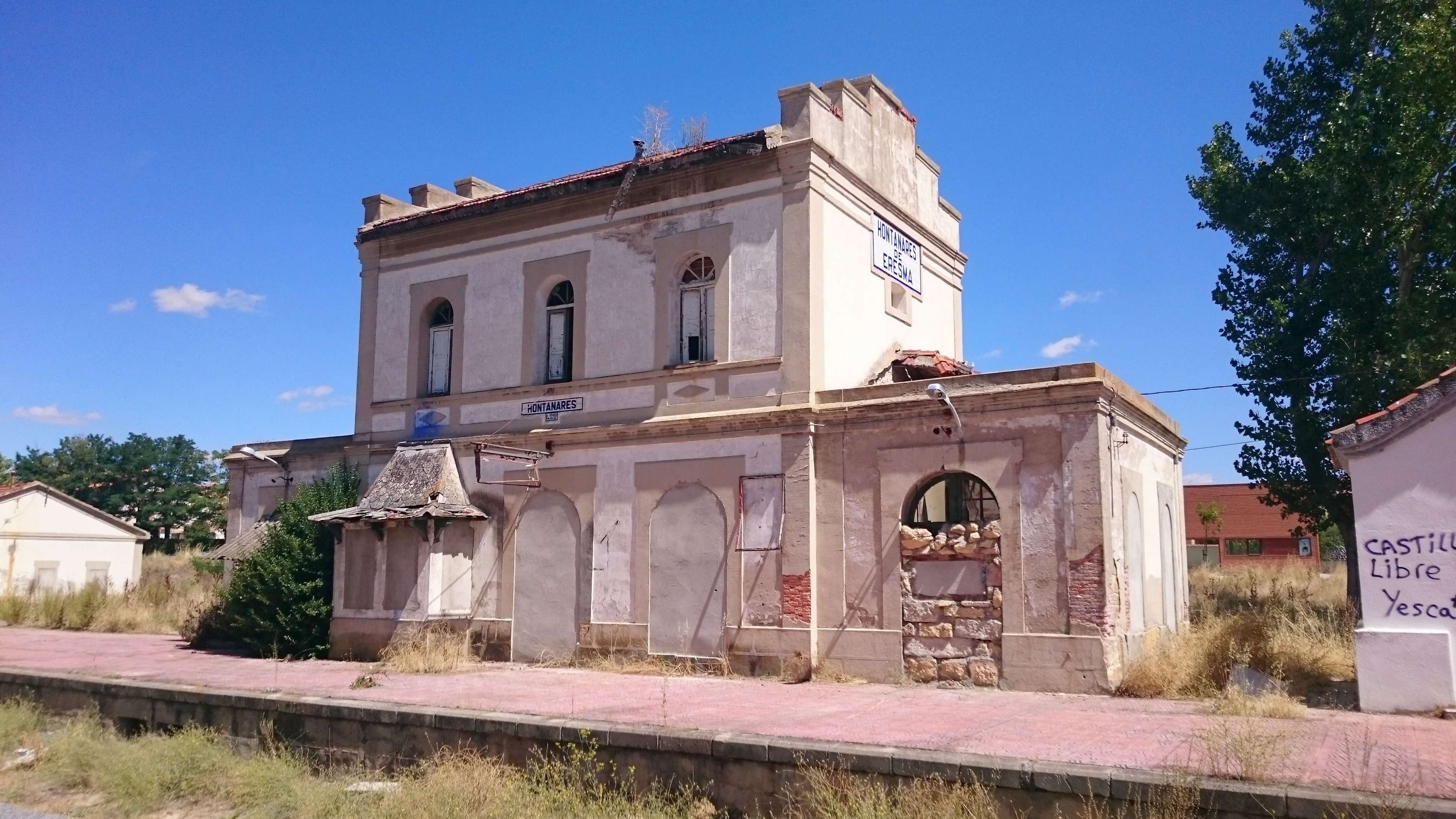 Antigua estación de la línea Villalba-Medina en Hontanares de Eresma